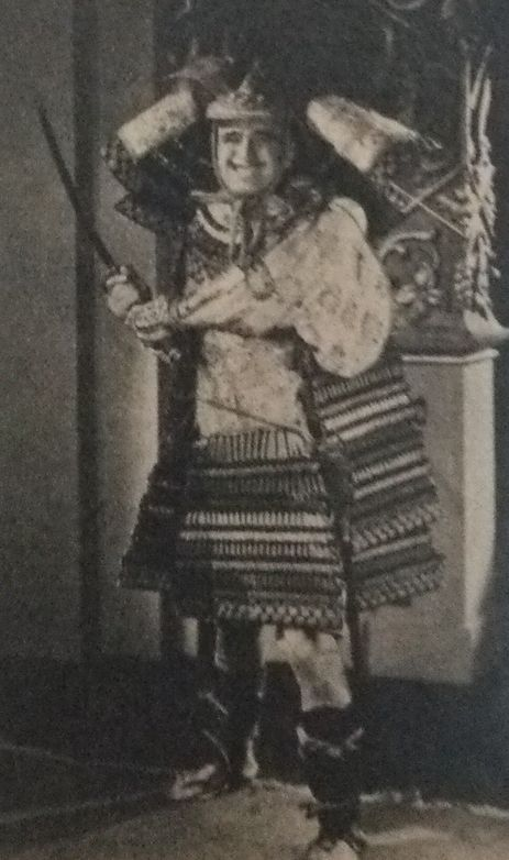 1929年の訪日時のダグラス・フェアバンクス